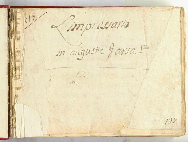 Frontespizio della partitura parzialmente autografa dell'opera.